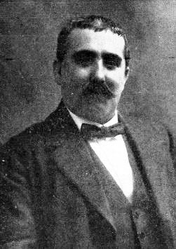 Rómulo Muro y Fernández